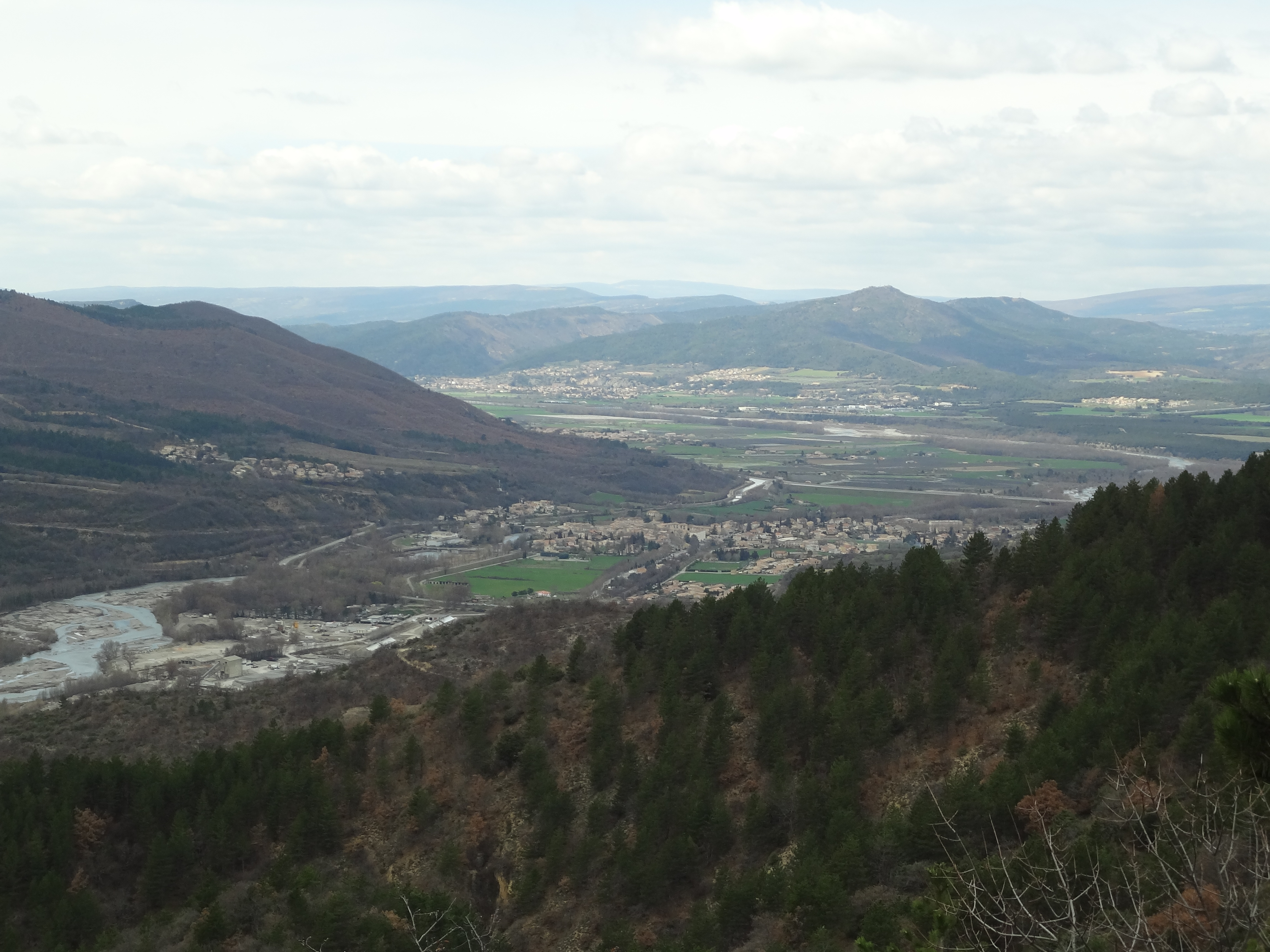 Vue de Malijai, vallée de la Bléone, Montfort au fond, de la colline Saint-Philippe à Mirabeau